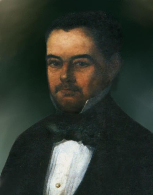 Pintura retratando o Major Silva Castro (vulgo Periquitão) (5 de janeiro 1792- 21 de outubro 1844). José Antônio da Silva Castro foi herói das lutas pela Independência da Bahia, onde comandou o "Batalhão dos Periquitos"; mudou-se para Caetité, onde morreu. Era avô do poeta Castro Alves.